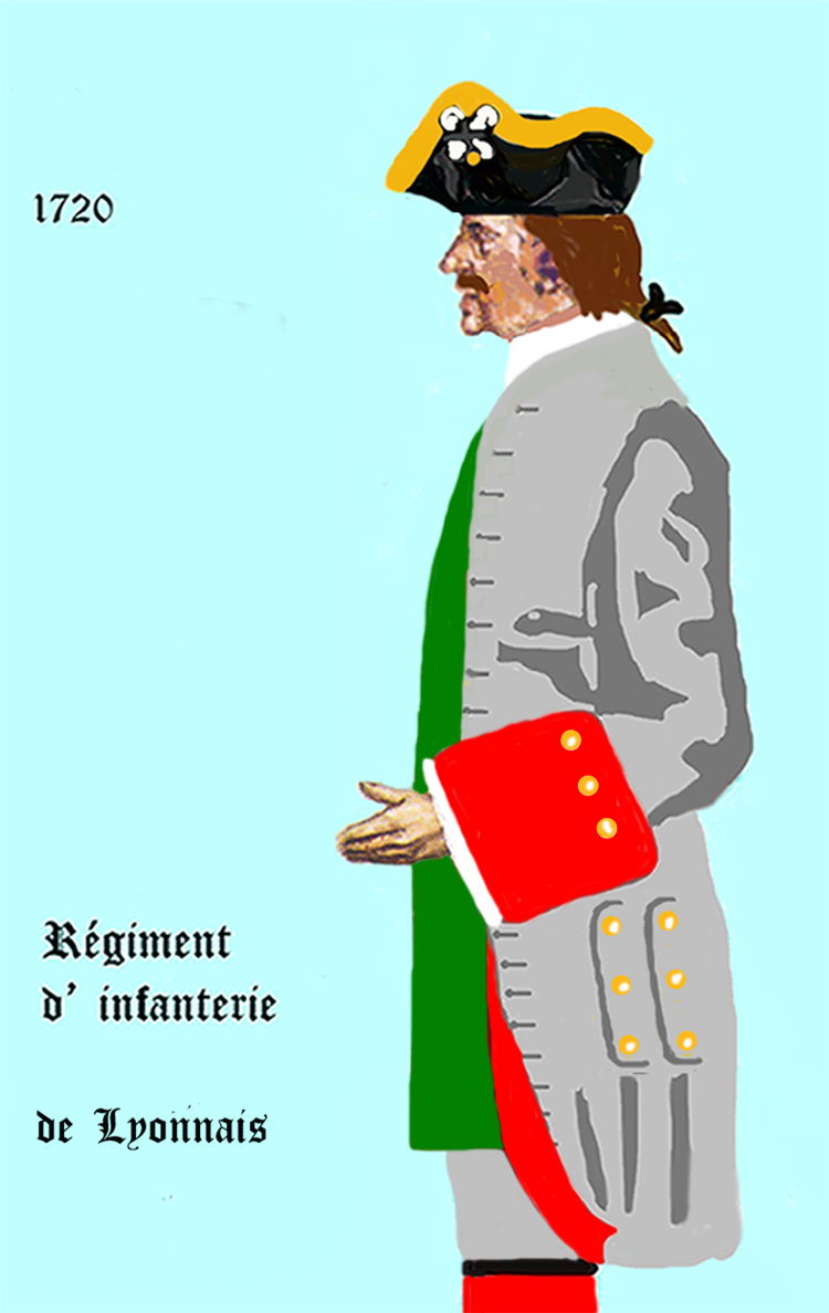 Uniform eines königlich französischen Infanterie-Regiments von 1720. - Entnommen und überarbeitet aus: „LES UNIFORMES ET LES DRAPEAUX DE L'ARMÉE DU ROI“ Marseille 1899.